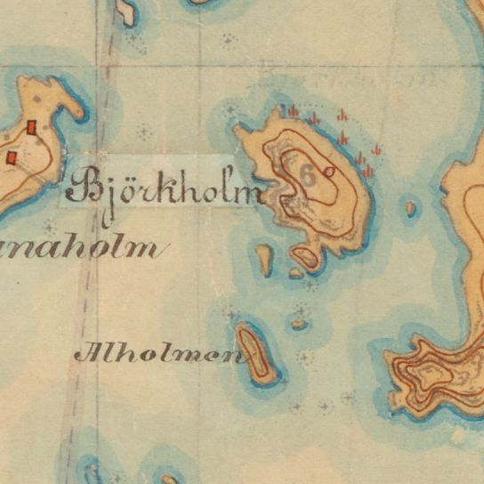 Lauttasaaren länsipuoliset Koivusaari ja Leppäsaari Senaatin kartastossa.